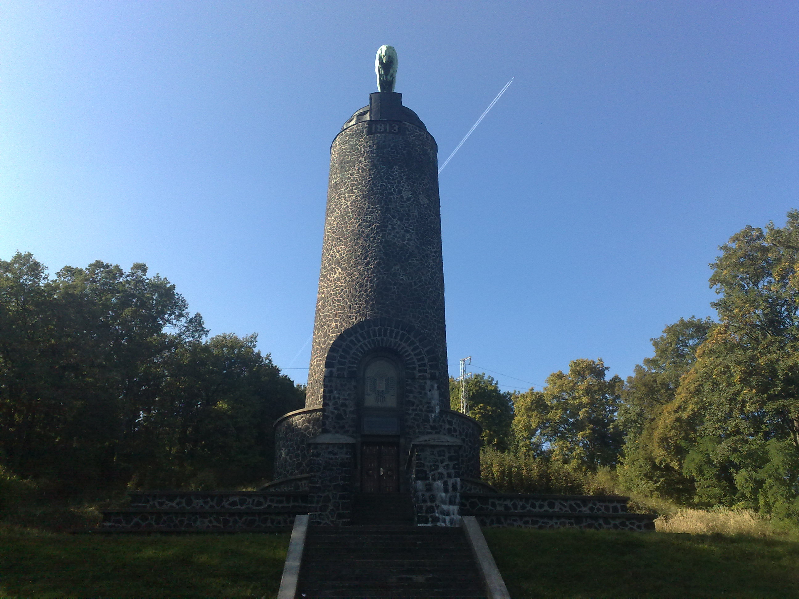 Památník vítězství nad Napoleonem v Chlumci.